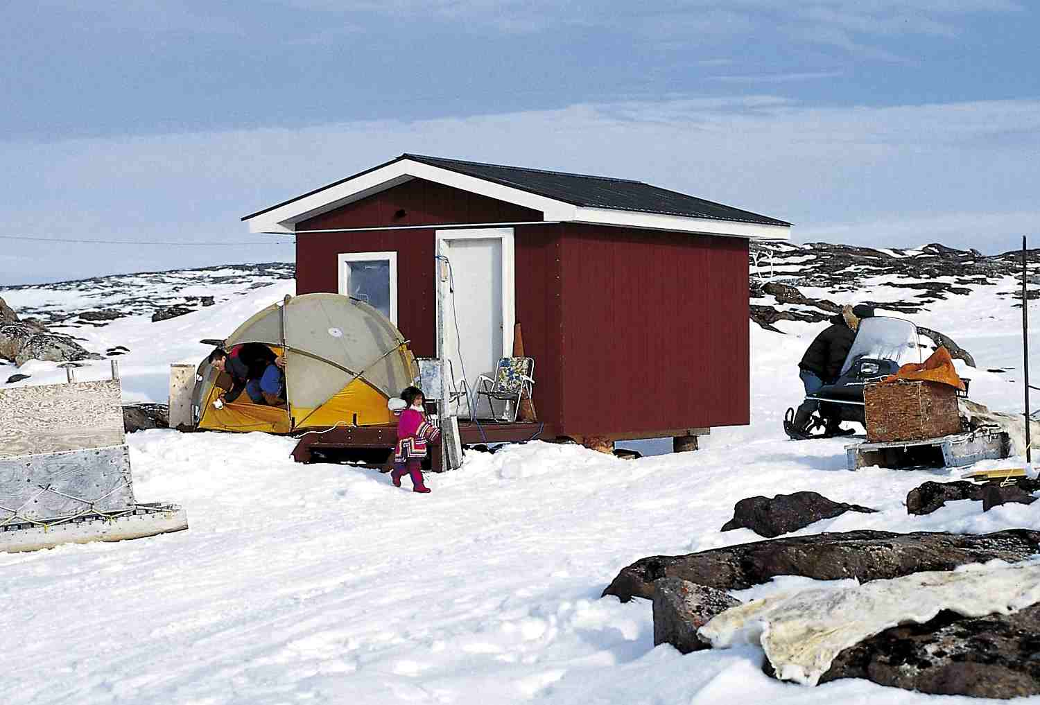 Modern cabin and tent (Camp Iqalurajuk)